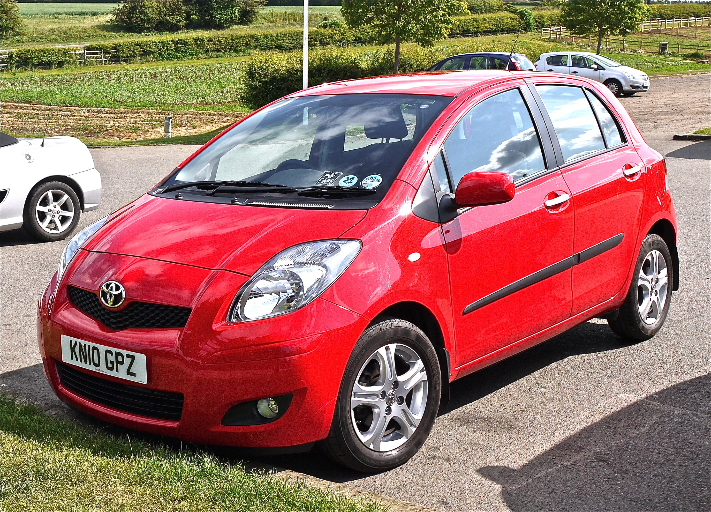 Panasonic G1 14-45 Lens